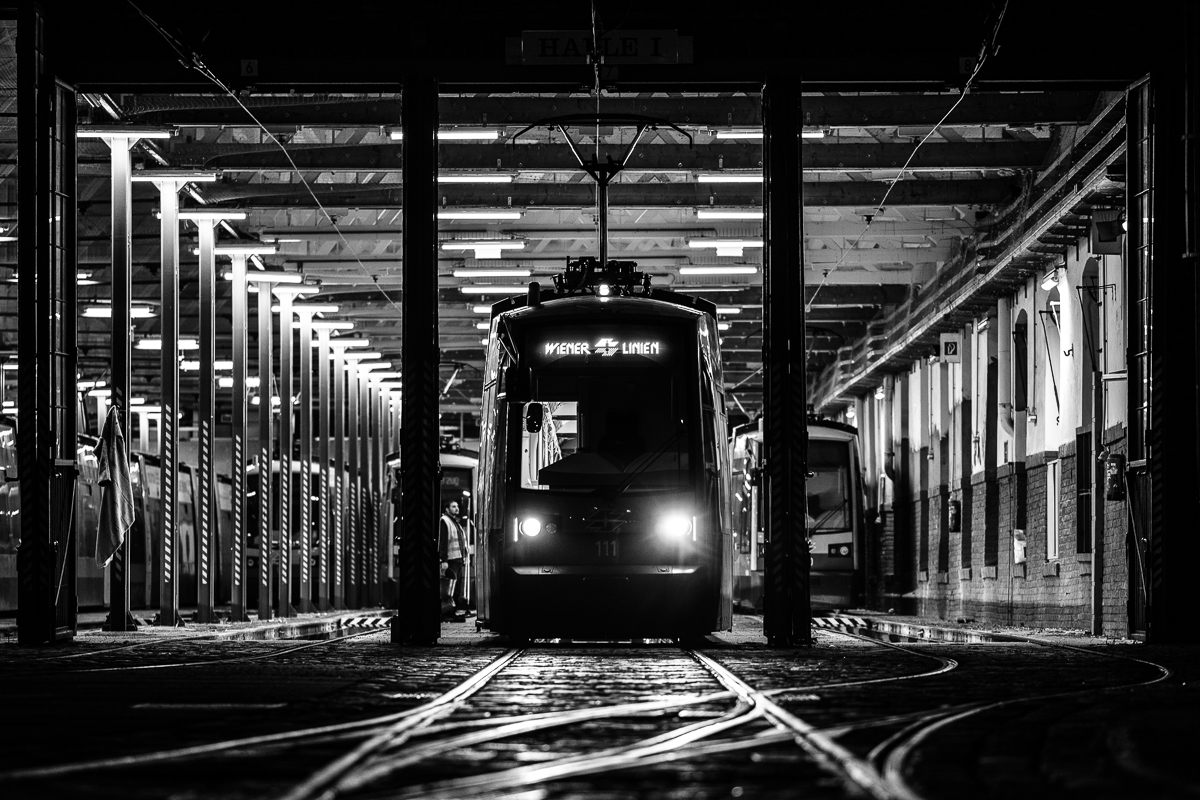 Zug (Typ ULF A1) beim Einfahren in die Remise Schwendergasse, 1150 Wien